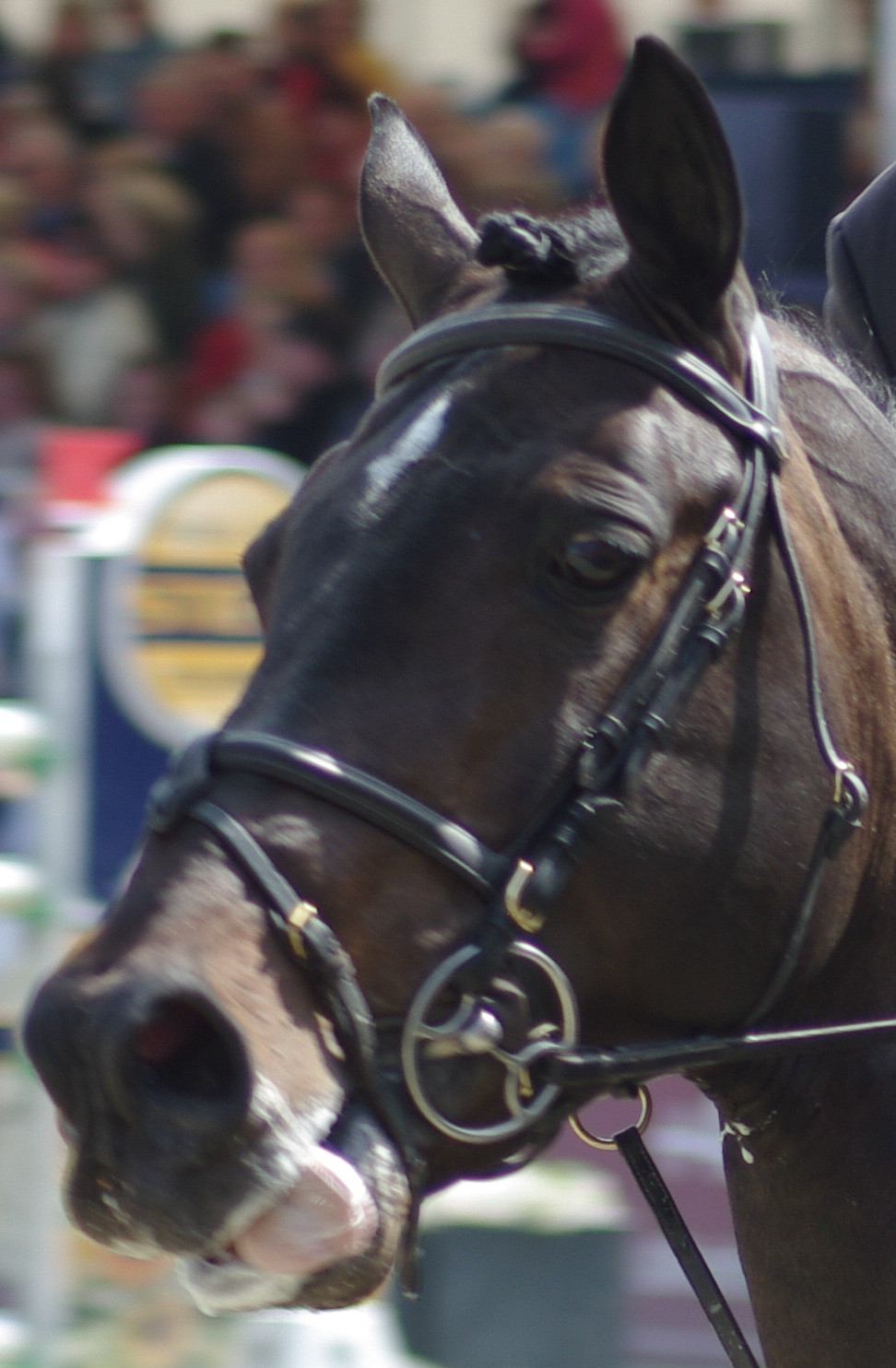 Tête d'Argento, cheval Anglo-européen